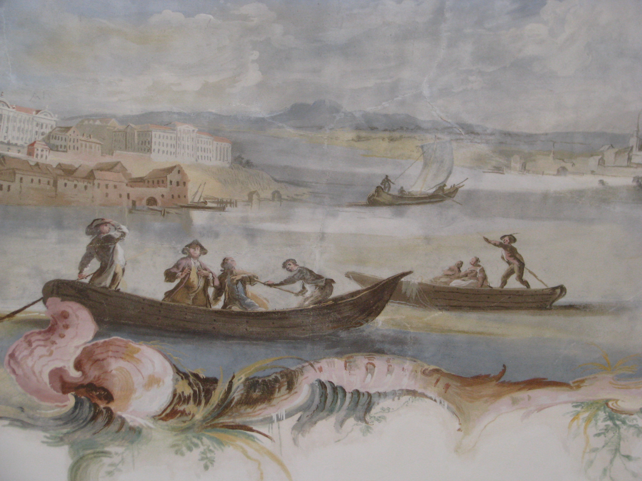 Deckengemälde Wallfahrtskapelle Maria zum Berge Karmel, Meersburg-Baitenhausen